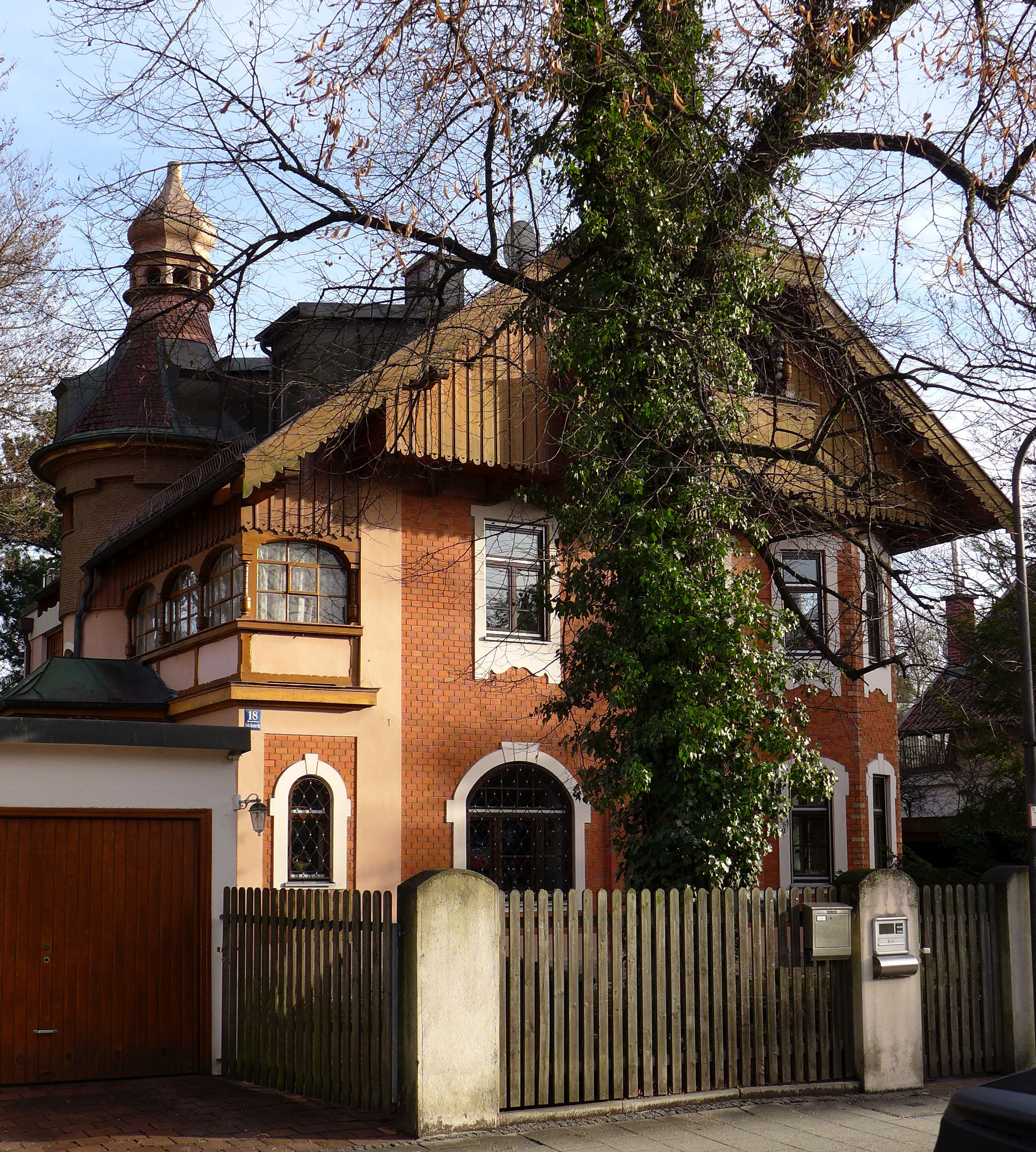 Fritz-Reuter-Str. 18, München